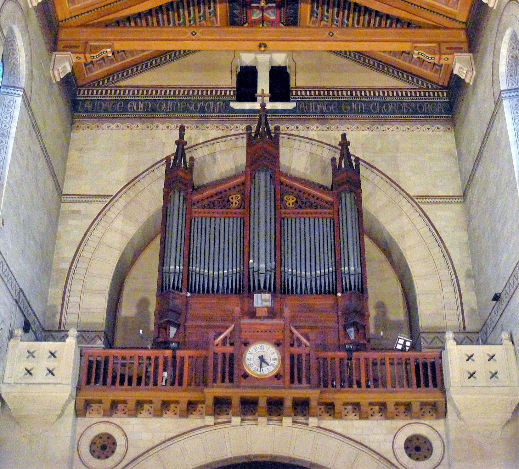 Église Saint-Pierre-de-Montrouge (orgue) - Paris XIV .